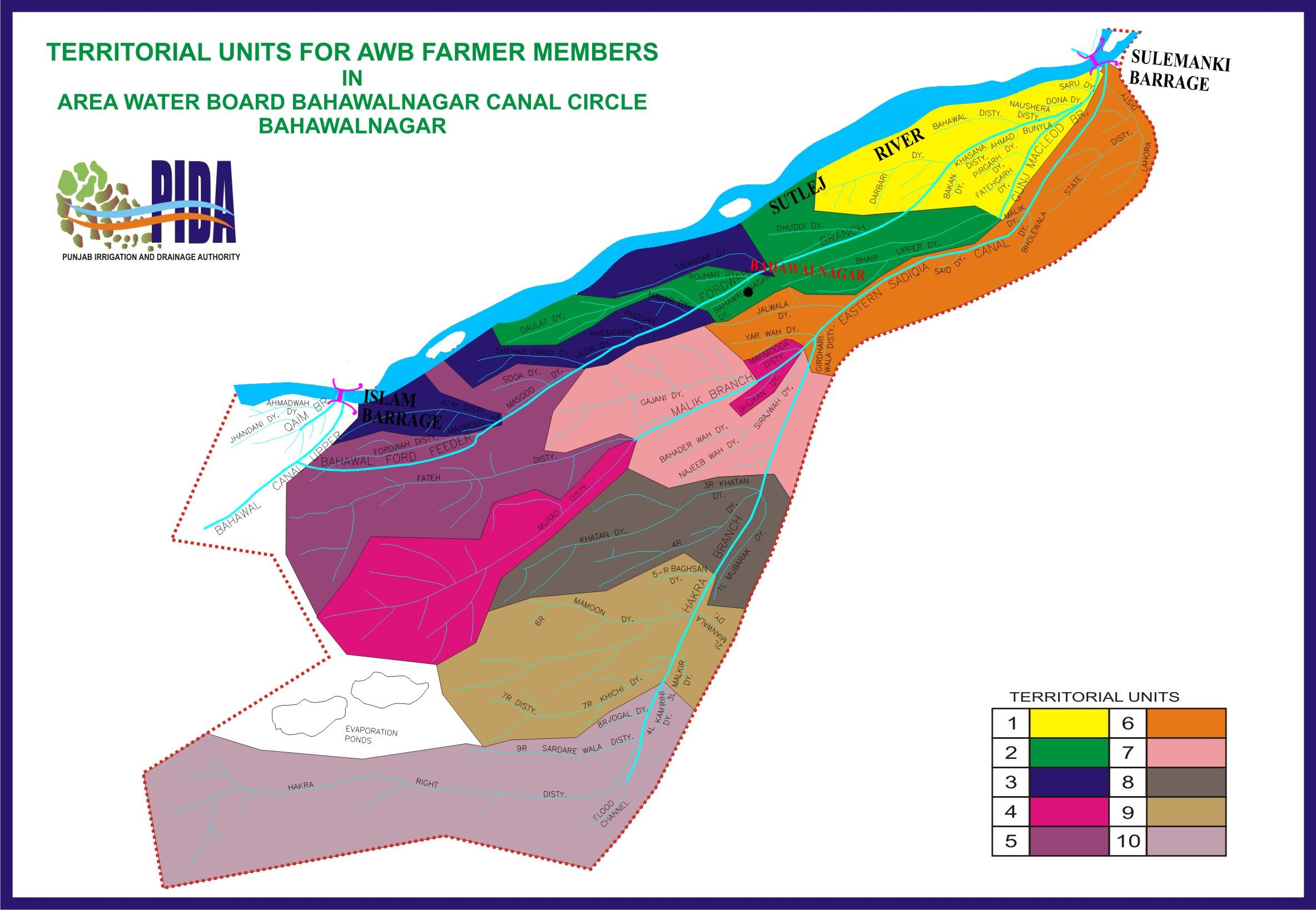 پنجابی: بہاولنگر ضلعے دا نہری نقشہ